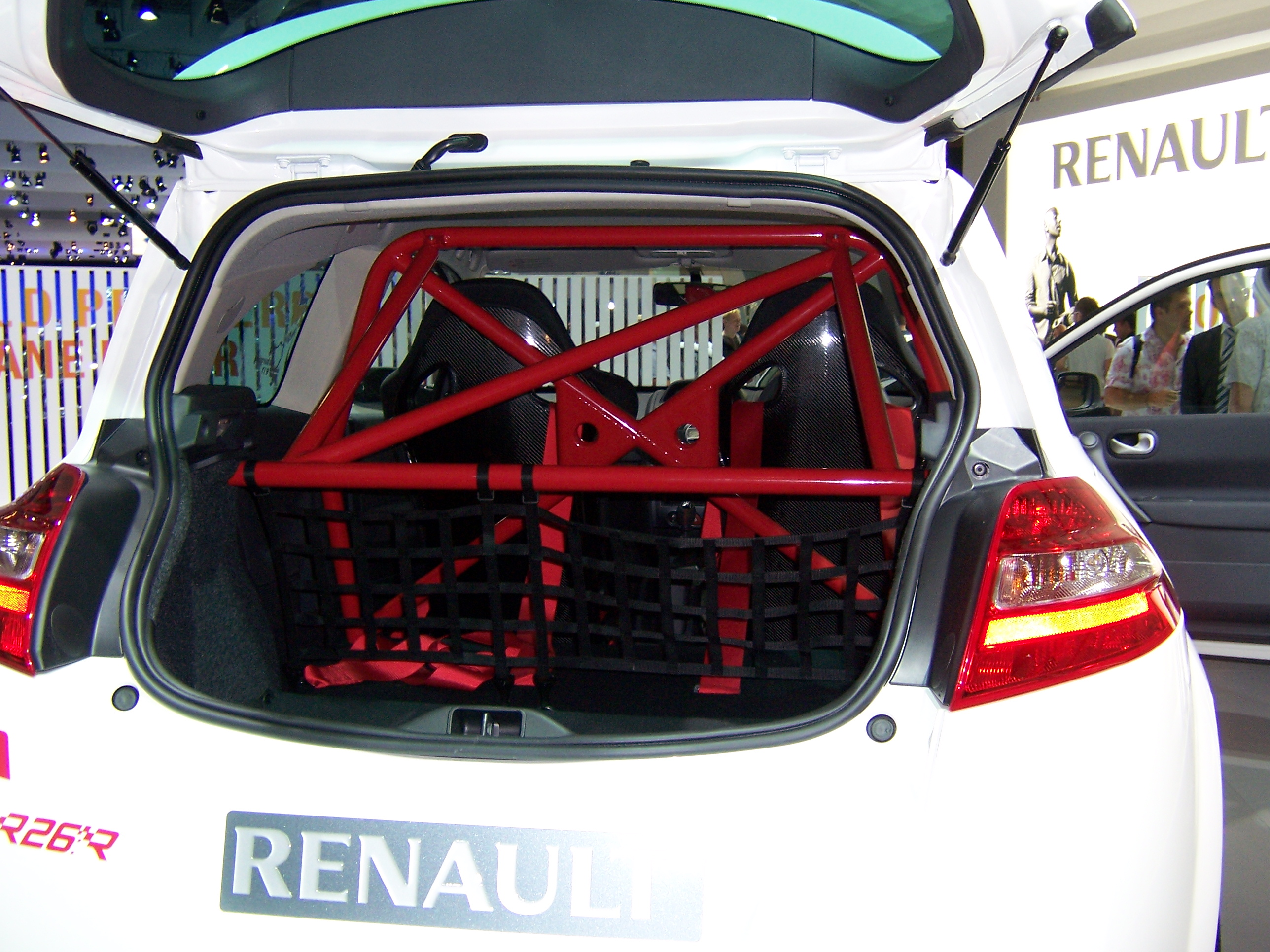 Renault Megane R26R